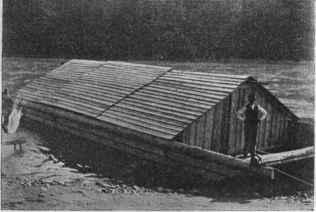 Pohorska plitka.